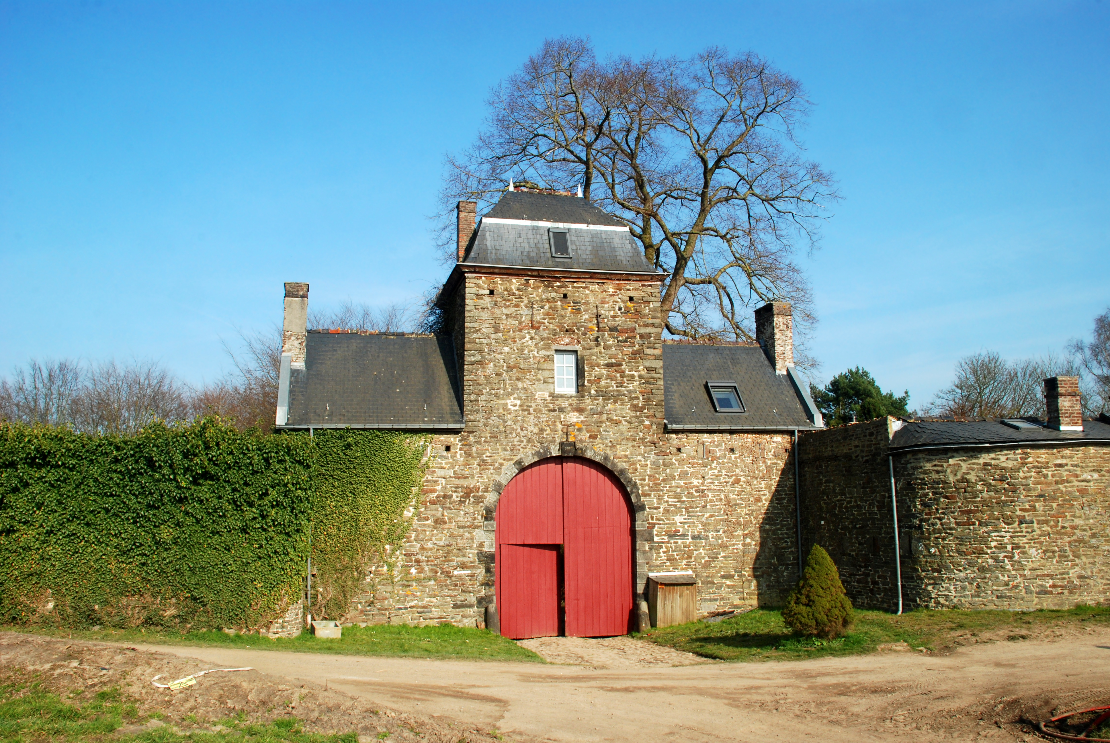 Belgique - Brabant wallon - Villers-la-Ville - Porte de Nivelles